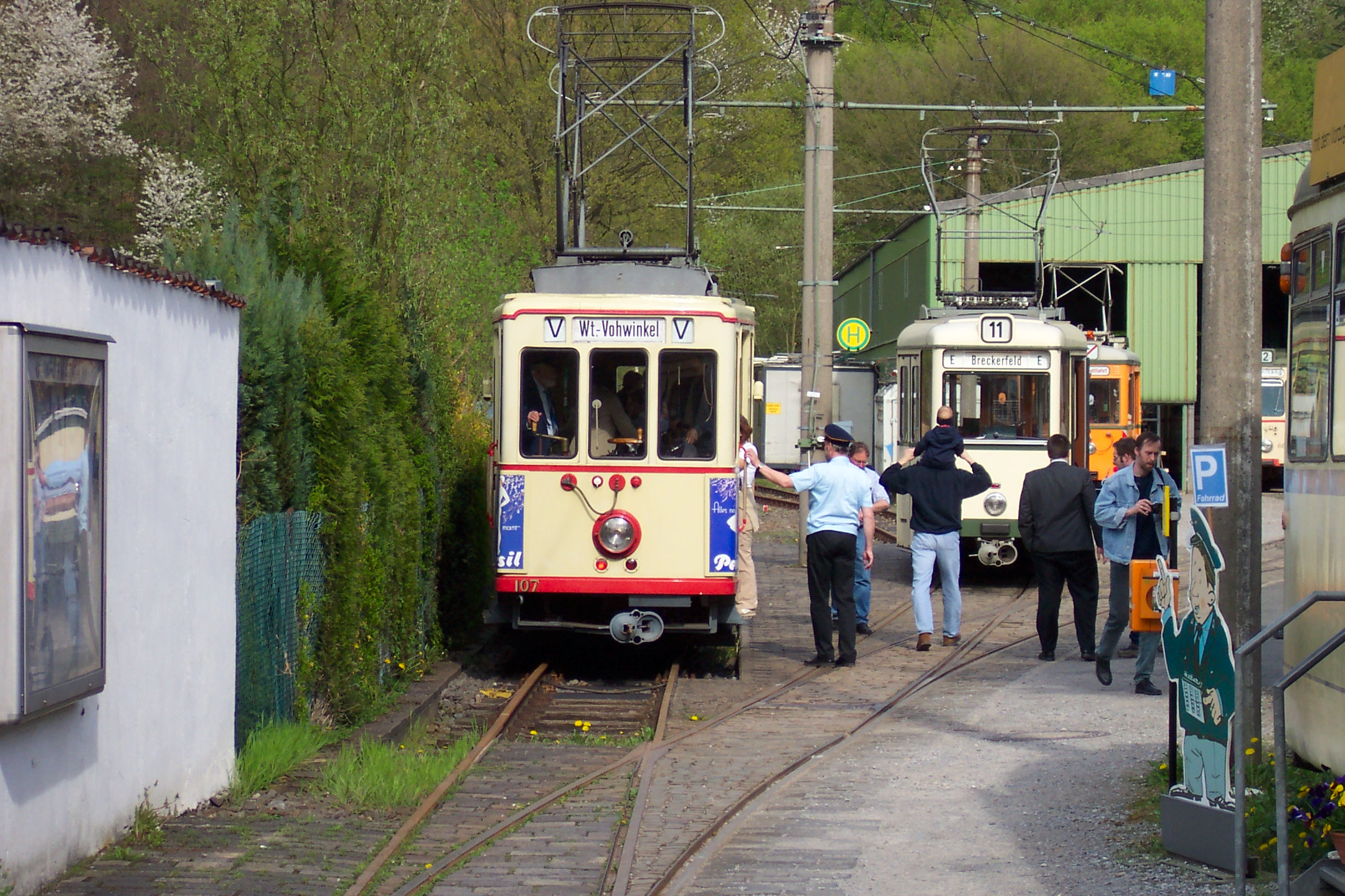 Triebwagen 107 (Baujahr 1935/36) der früheren Straßenbahnlinie V Benrath - Hilden - Haan - Vohwinkel (1899 als Teilstrecke des sogenannten Benrather Netzes der Actiengesellschaft Bergische Kleinbahnen eröffnet, 1911 von der Stadt Düsseldorf übernommen und an die Rheinische Bahngesellschaft AG - heute Rheinbahn AG verpachtet). Der Straßenbahnlinie wurde 1935 der Linienbuchstabe V (für Vohwinkel) zugeteilt. Sie wurde 1961 eingestellt. Der Triebwagen 107 steht im Bergischen Straßenbahnmuseum in Wuppertal-Kohlfurth [1] [2].